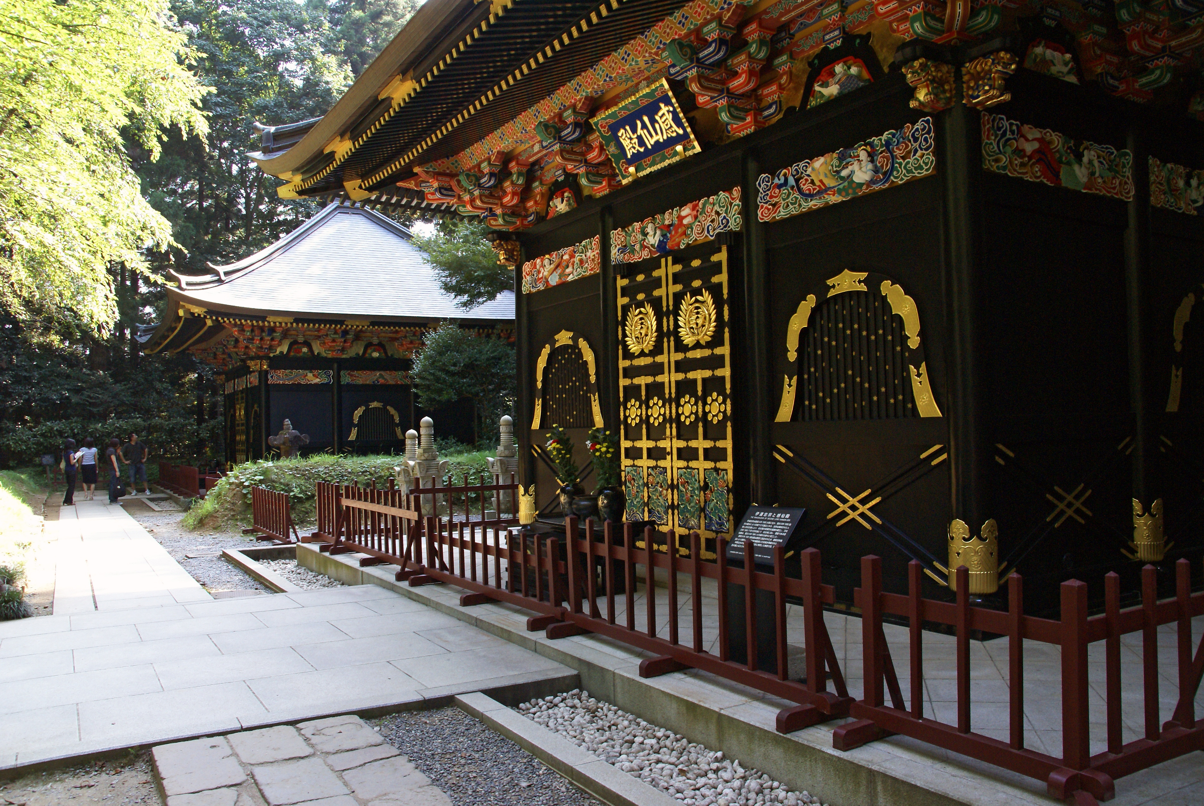 Zuiho-den in Sendai, Miyagi prefecture, Japan